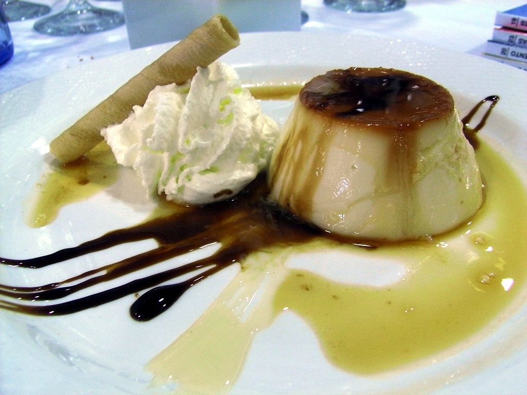 Flan con nata y barquillo.